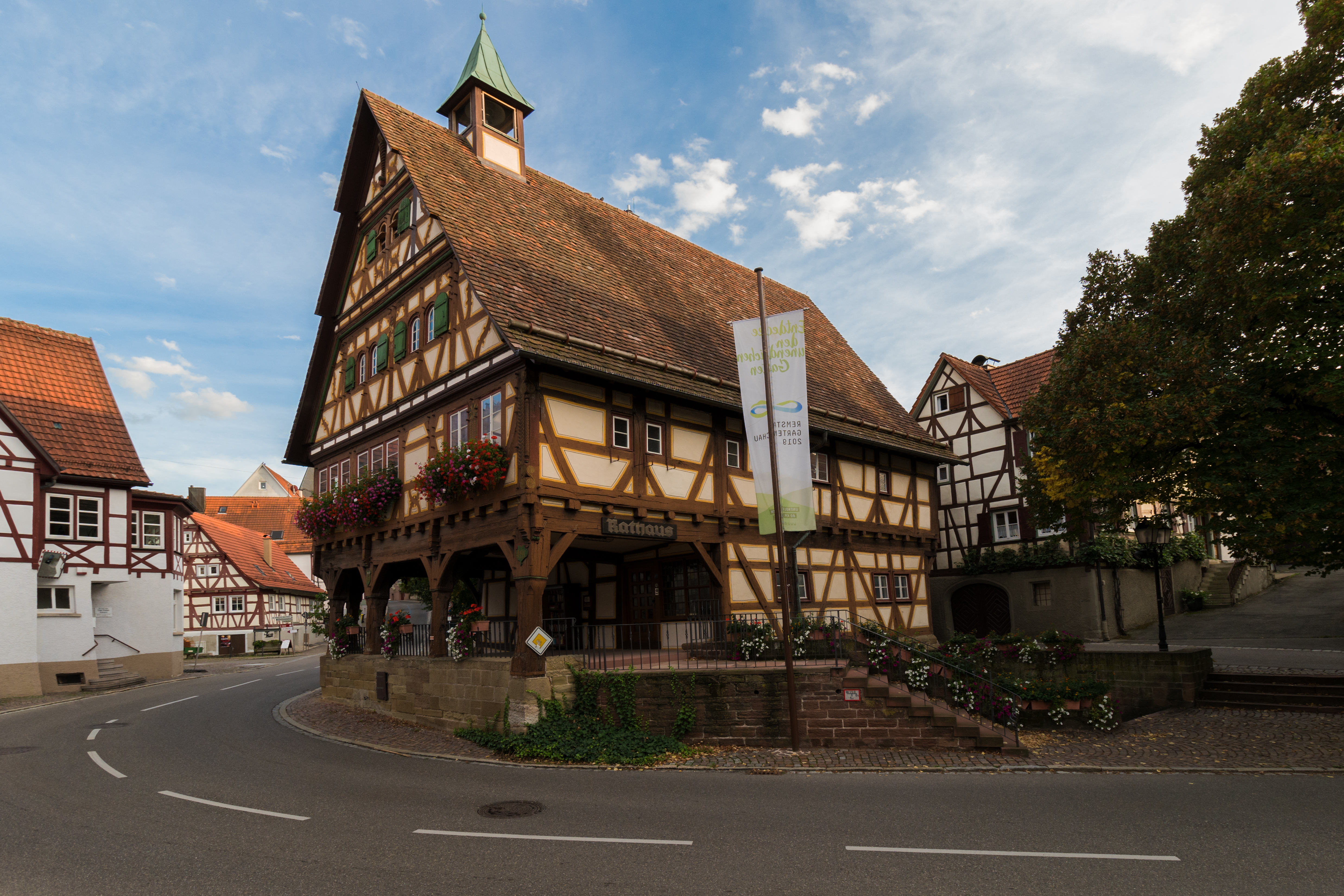 Das Bild zeigt das alte Rathaus in Weinstadt-Strümpfelbach.